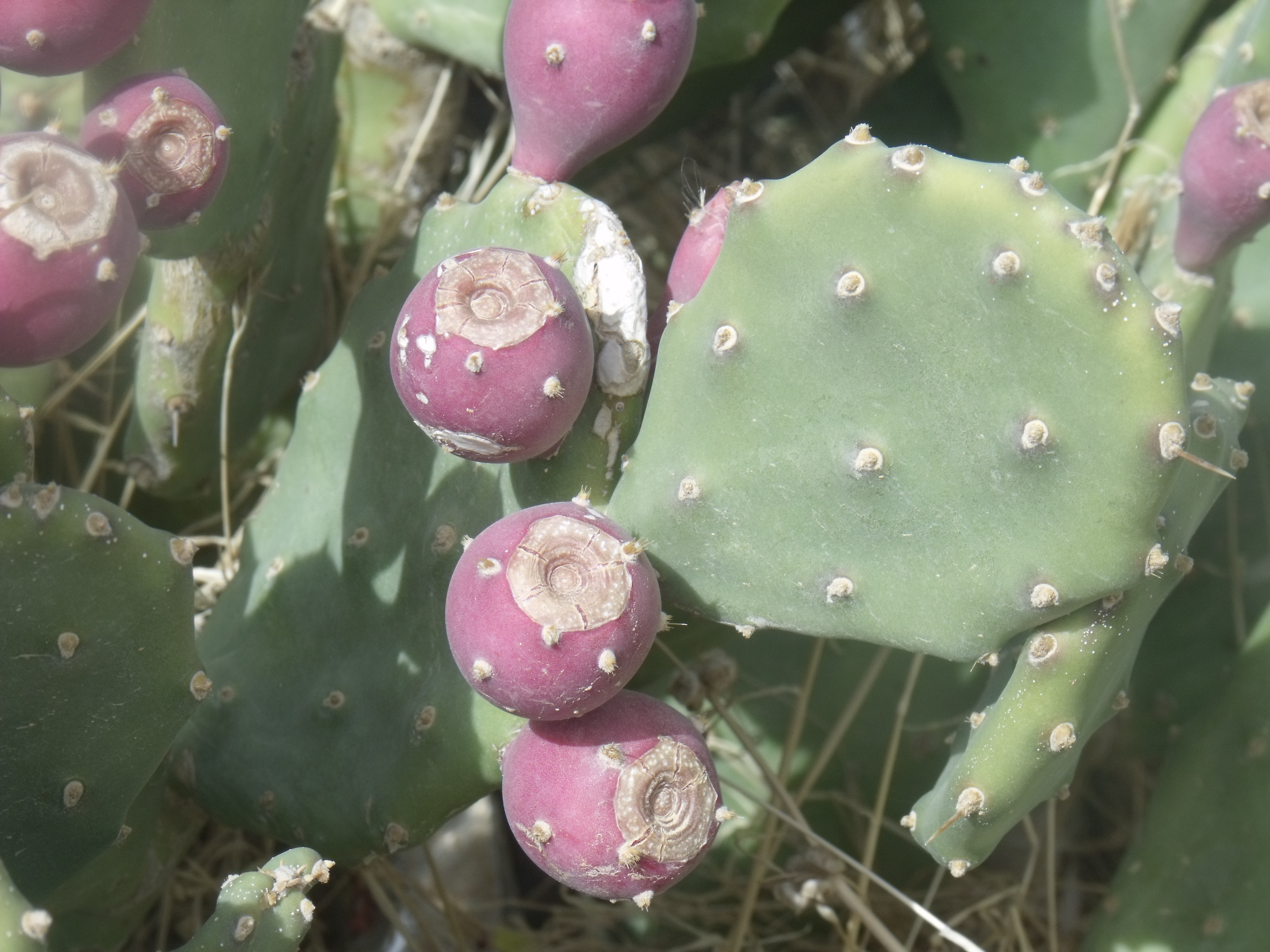 fruits +/- pyriformes (toujours de teinte pourpre). Photo prise au pied du Djebel Orbata, à Cheaba, hameau de Lalla près de Gafsa (Tunisie)